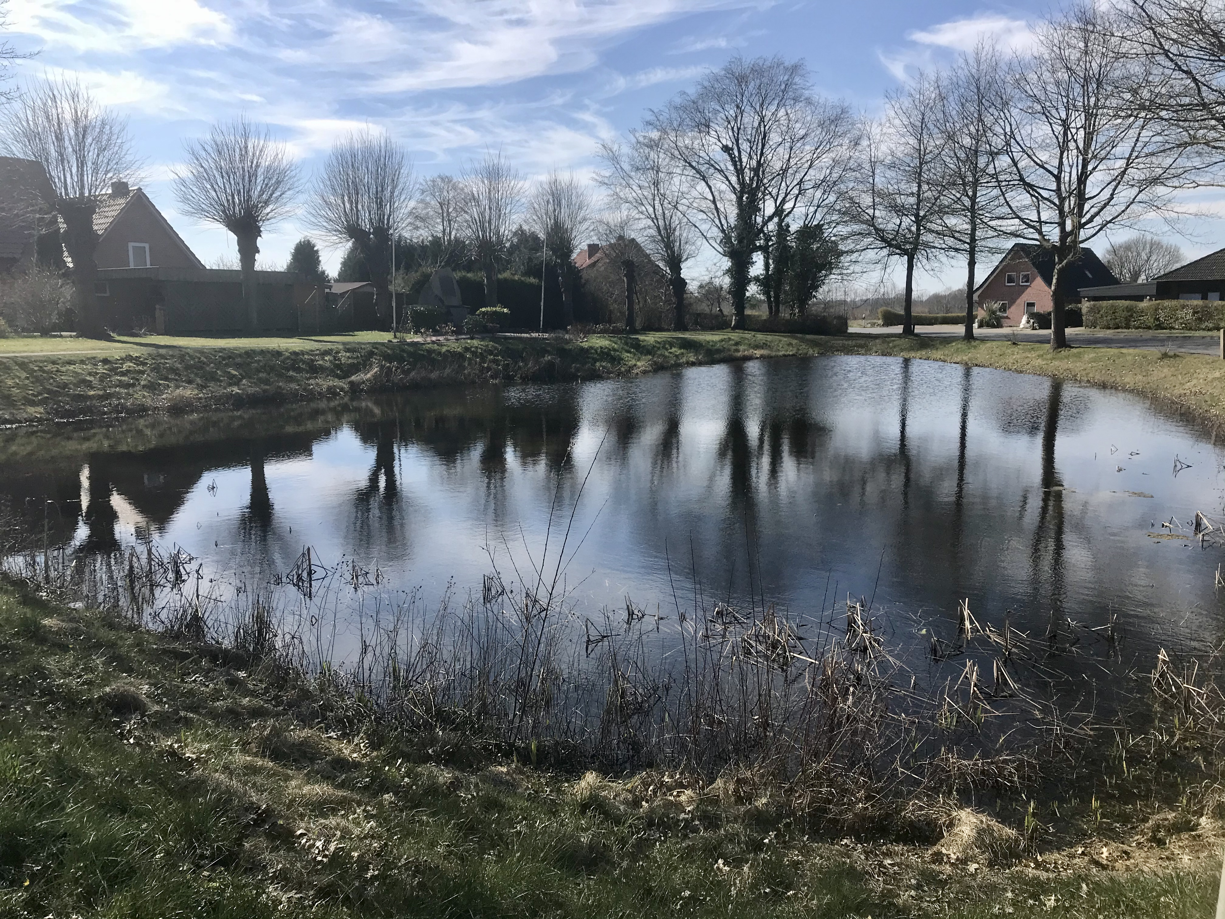 Dorfteich Sievershütten, Deutschland